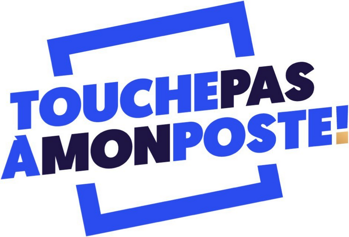 Logo de l'émission de télévision française Touche pas à mon poste ! depuis la saison 9 (septembre 2017).